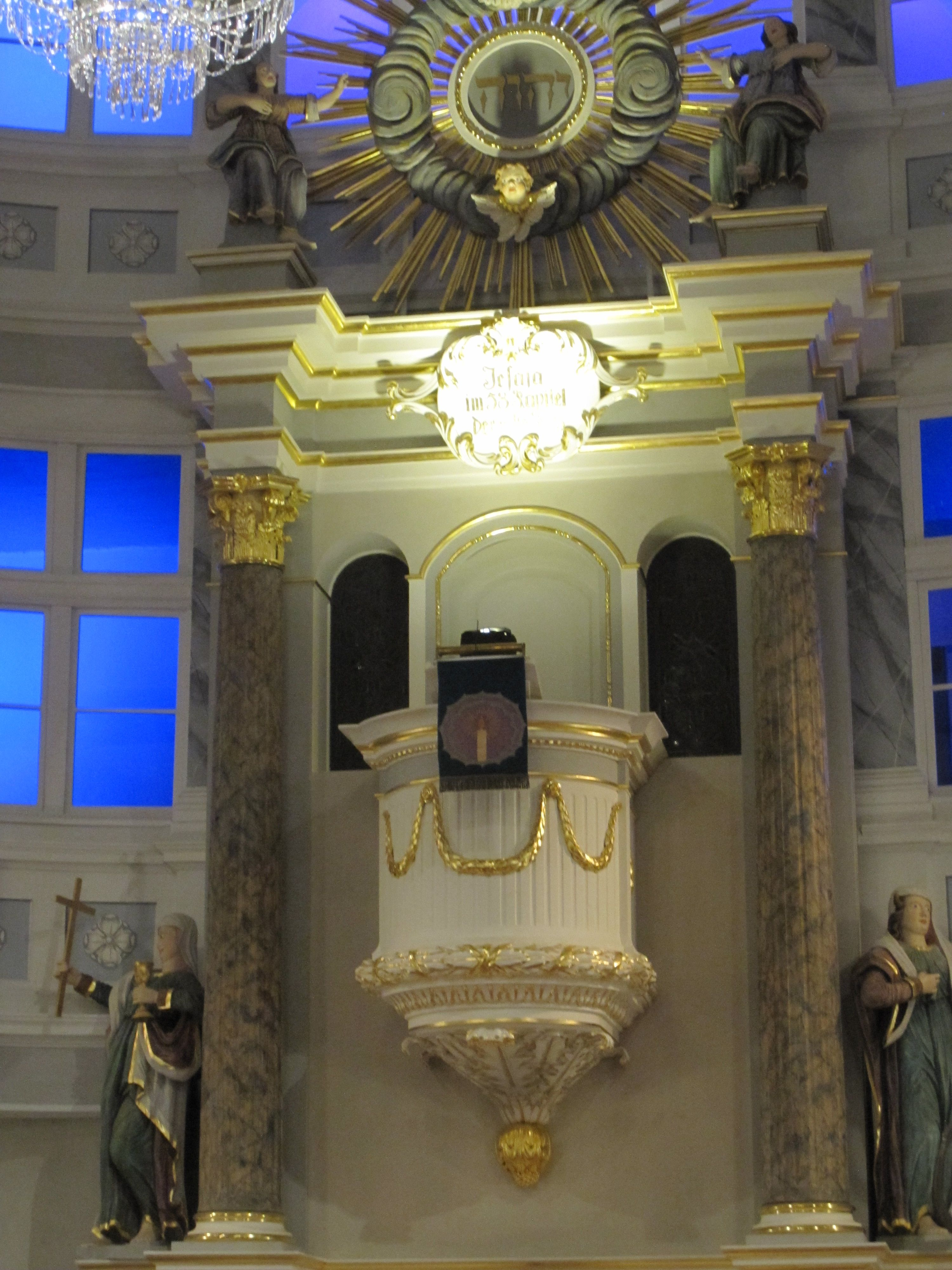 Grünhain: St. Nicolai-Kirche - 1808 bis 1812 als klassizistische Saalkirche gebaut. „Der große helle Saal mit flacher Putzdecke und umlaufenden, zweigeschossigen, von Pfeilern getragenen Emporen, die im Bogen hinter dem Kanzelaltar weitergeführt und dort zu verglasten Betstuben ausgebaut sind. Orgelempore leicht vorgewölbt“ (Dehio, Kunstführer, Sachsen II, 1998, Seite 375) Der Kanzelaltar datiert von 1812, das Taufbecken ist auch klassizistisch. An den in Grünhain geborenen Johann Hermann Schein (1596 – 1630, Barockkomponist – „Isrealisbrünnlein“ – und Thomaskantor) erinnern im Altarbereich ein Portrait und eine Gedenktafel aus dem Jahr 1897. Die ungewöhnliche blaue Beleuchtung der Betstuben ist eine Inszenierung des „Musikfests Erzgebirge“ anläßlich des Konzerts am 16. September 2014.